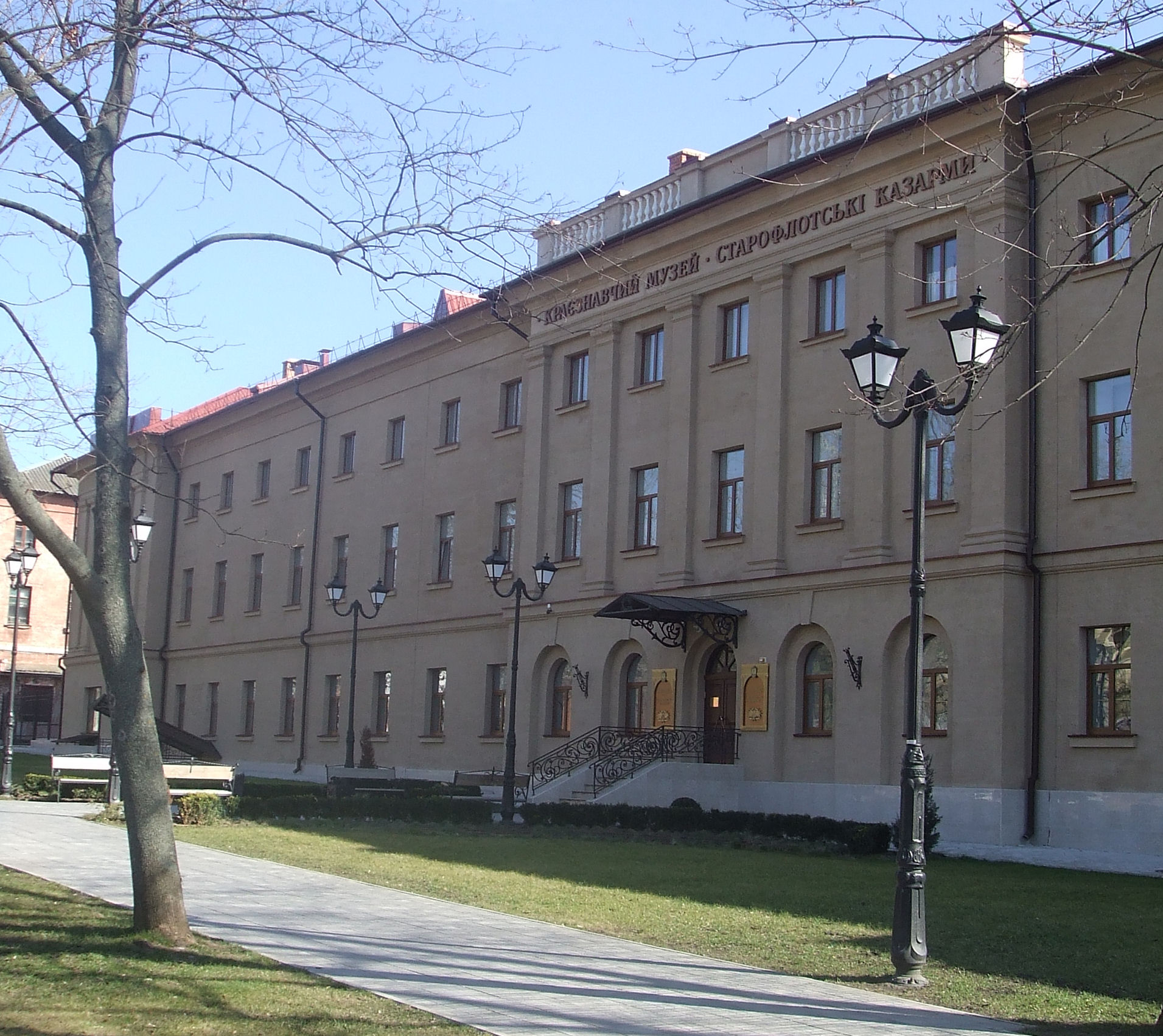 Миколаївська весна у Вікіпедії